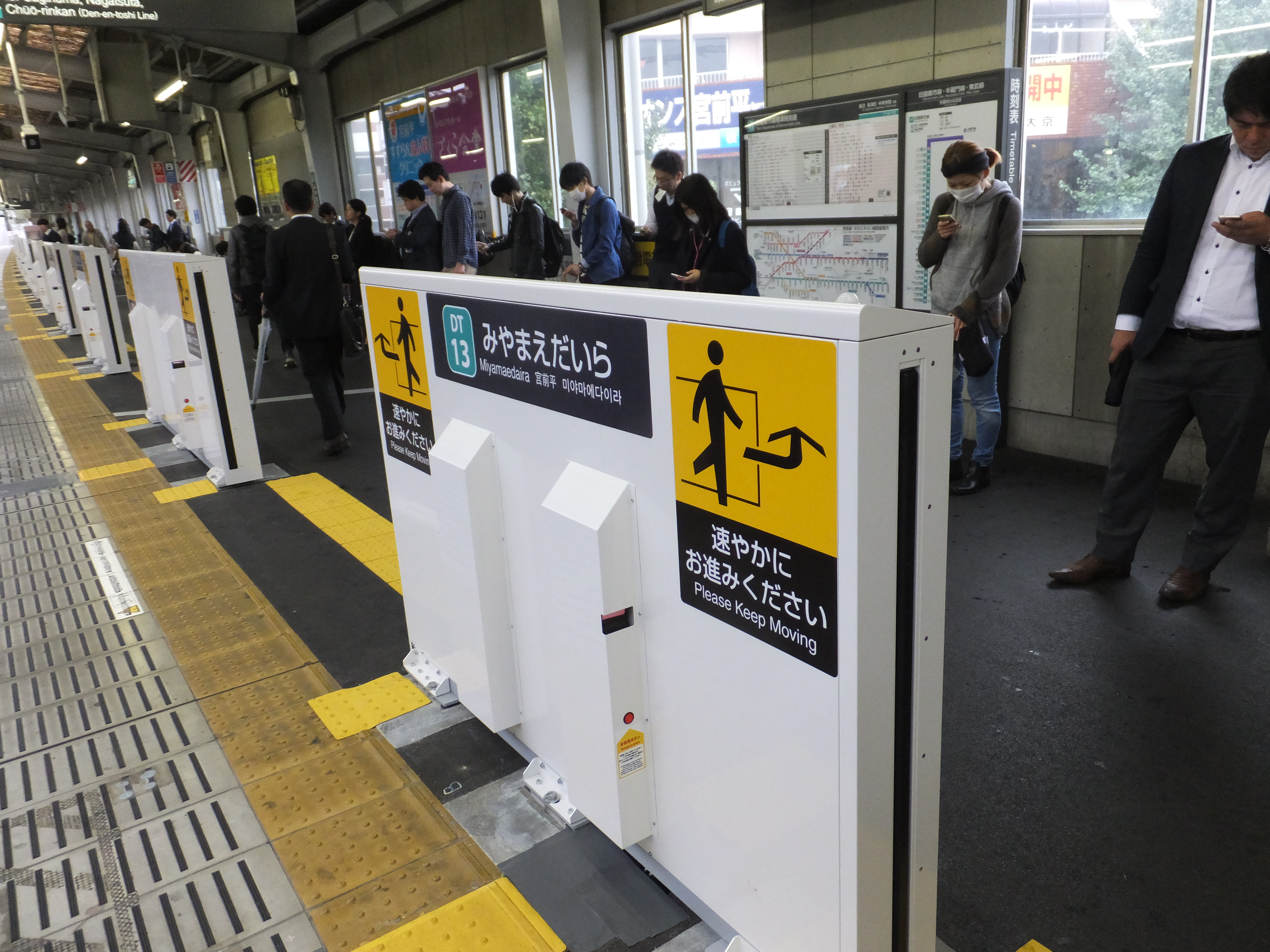 東急田園都市線宮前平駅に2015年9月に設置されたホームドア。通常の位置よりホーム内側に設置する事で、6ドア車での乗降に対応している。ゲートはまだ稼働していない。